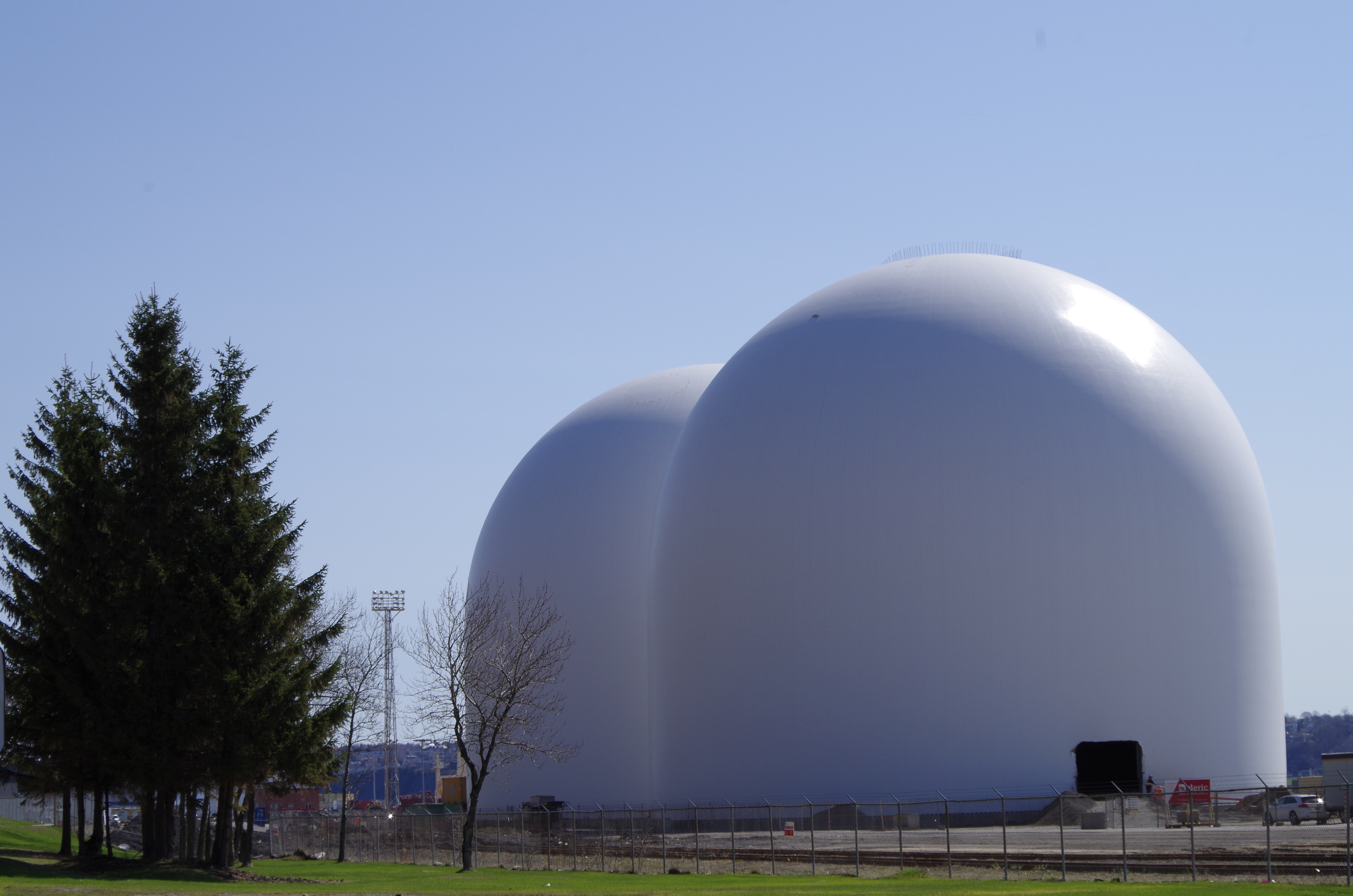 Silos de granules de bois à l'anse au Foulon situé dans la ville de Québec